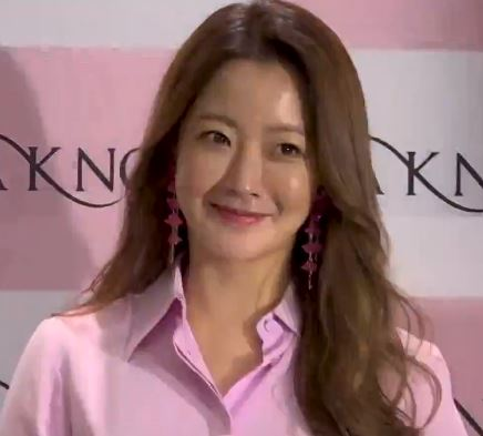 봄의 여신